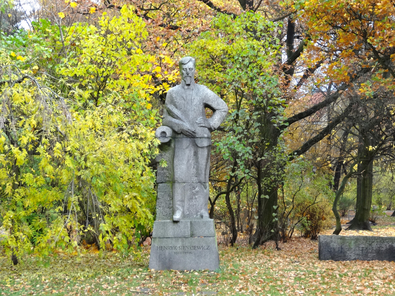 Pomnik Henryka Sienkiewicza w parku im. Jana Kochanowskiego w Bydgoszczy